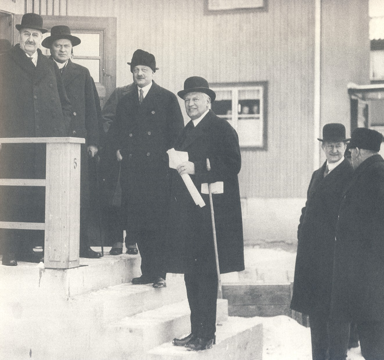 Axel Dahlberg (i mitten med ritningsrulle) visar nybyggt egna hem i Norr Ängby för statsminister Carl Gustaf Ekman och stadtråden Sam Statender och Åke Holmbäck, 14 febr 1932